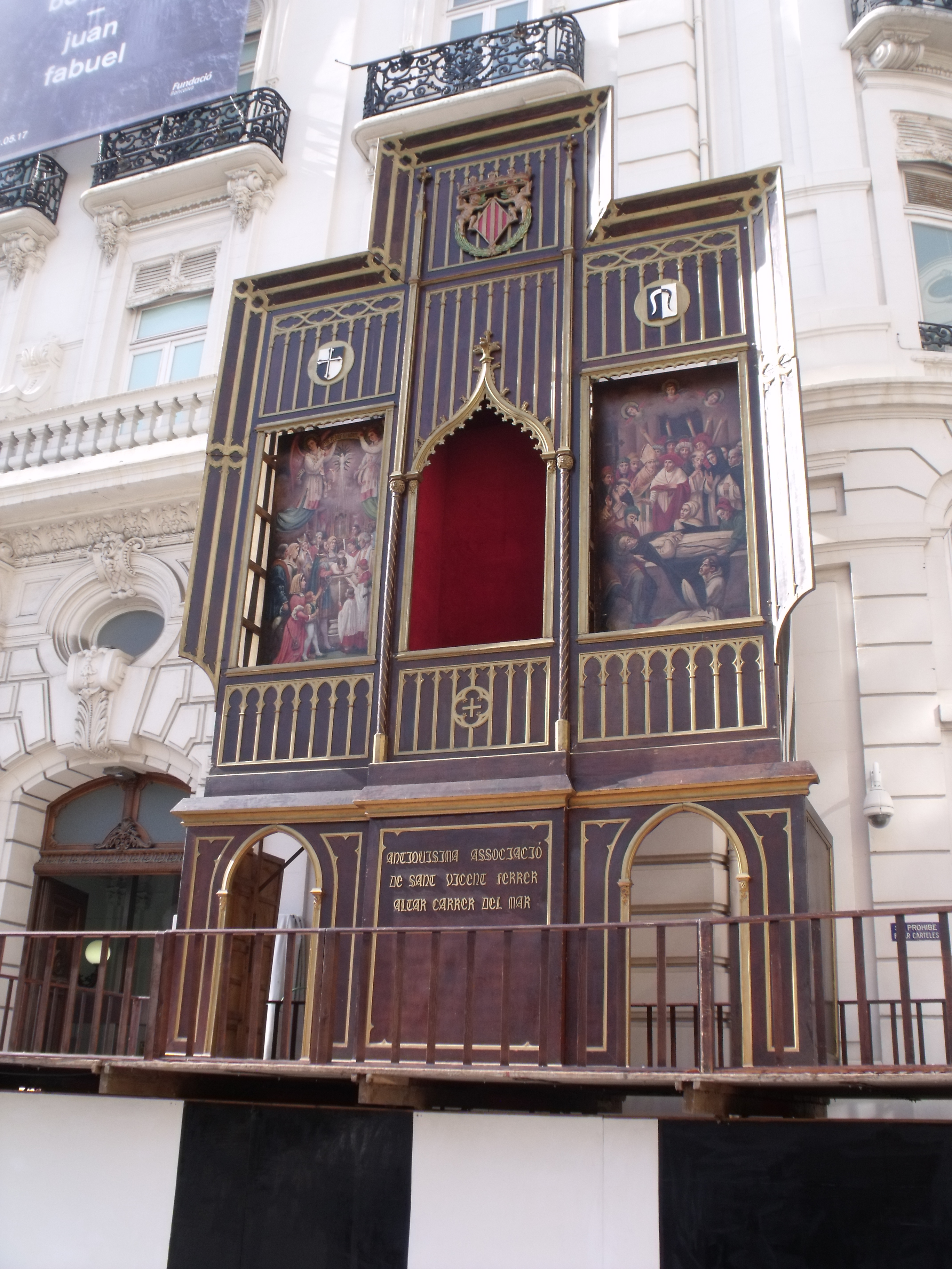 Fiesta patronales de San Vicente Ferrer, altar de la calle del Mar This is a photography of a Folklore festival in Spain (Wikidata id Q5861379).